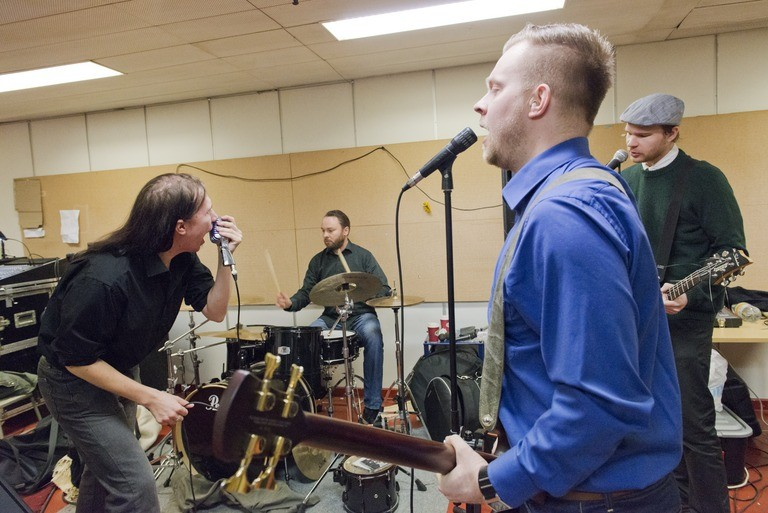 Bob Malmström -yhtyeen jäsenet harjoittelemassa treenikämpällä Katajanokalla, Kanavaranta 3.